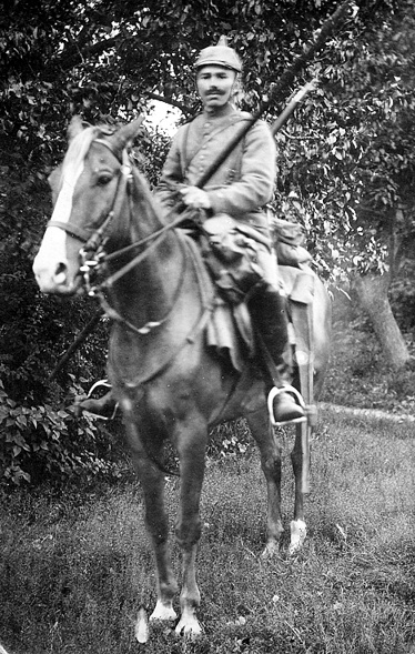 Badischer Dragoner 1914, aufgesessen in feldgrauer Uniform und voller Ausrüstung (Lanze, Säbel, Karabiner)